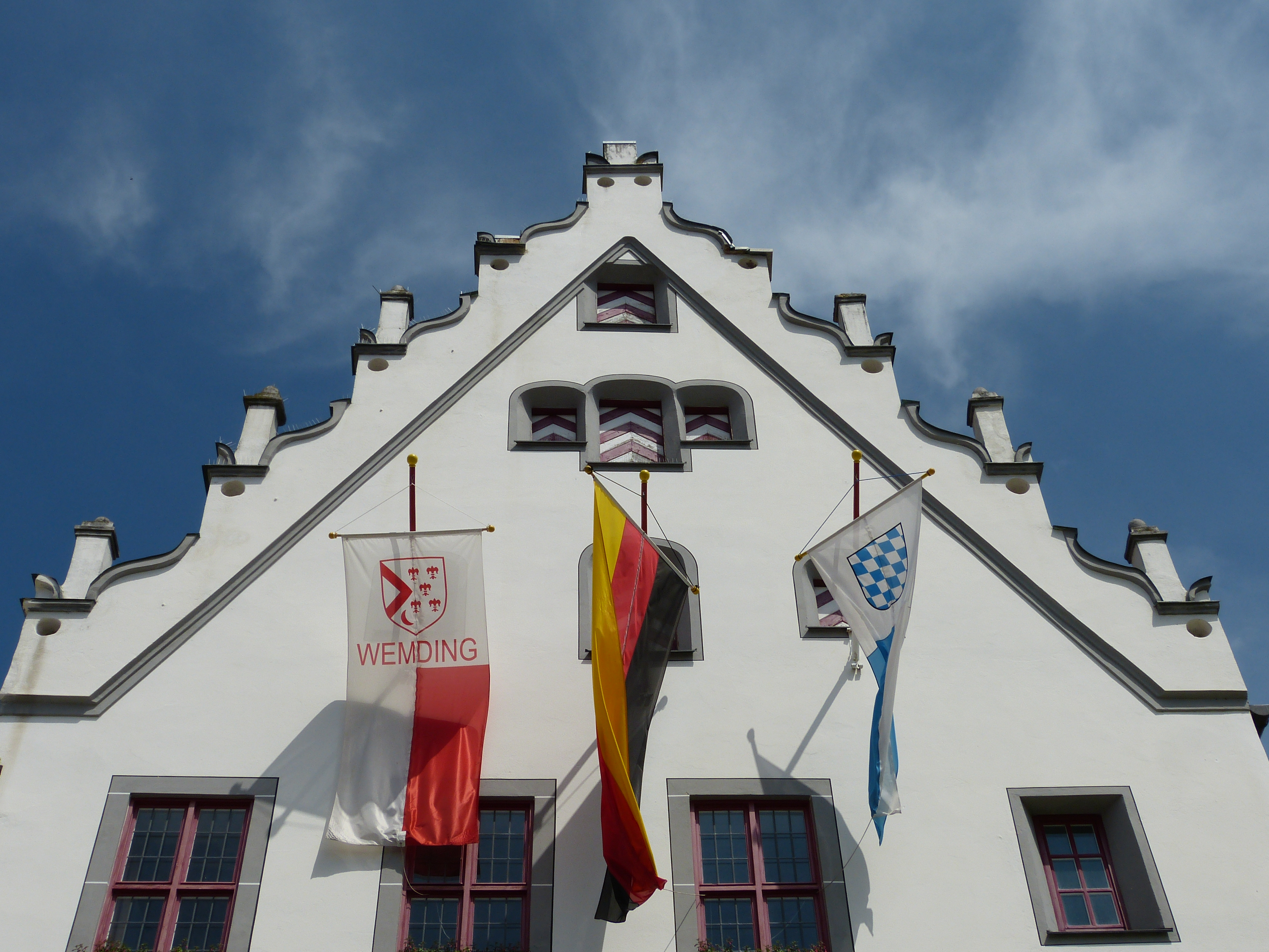 Bayerische Flagge am historischen Rathaus